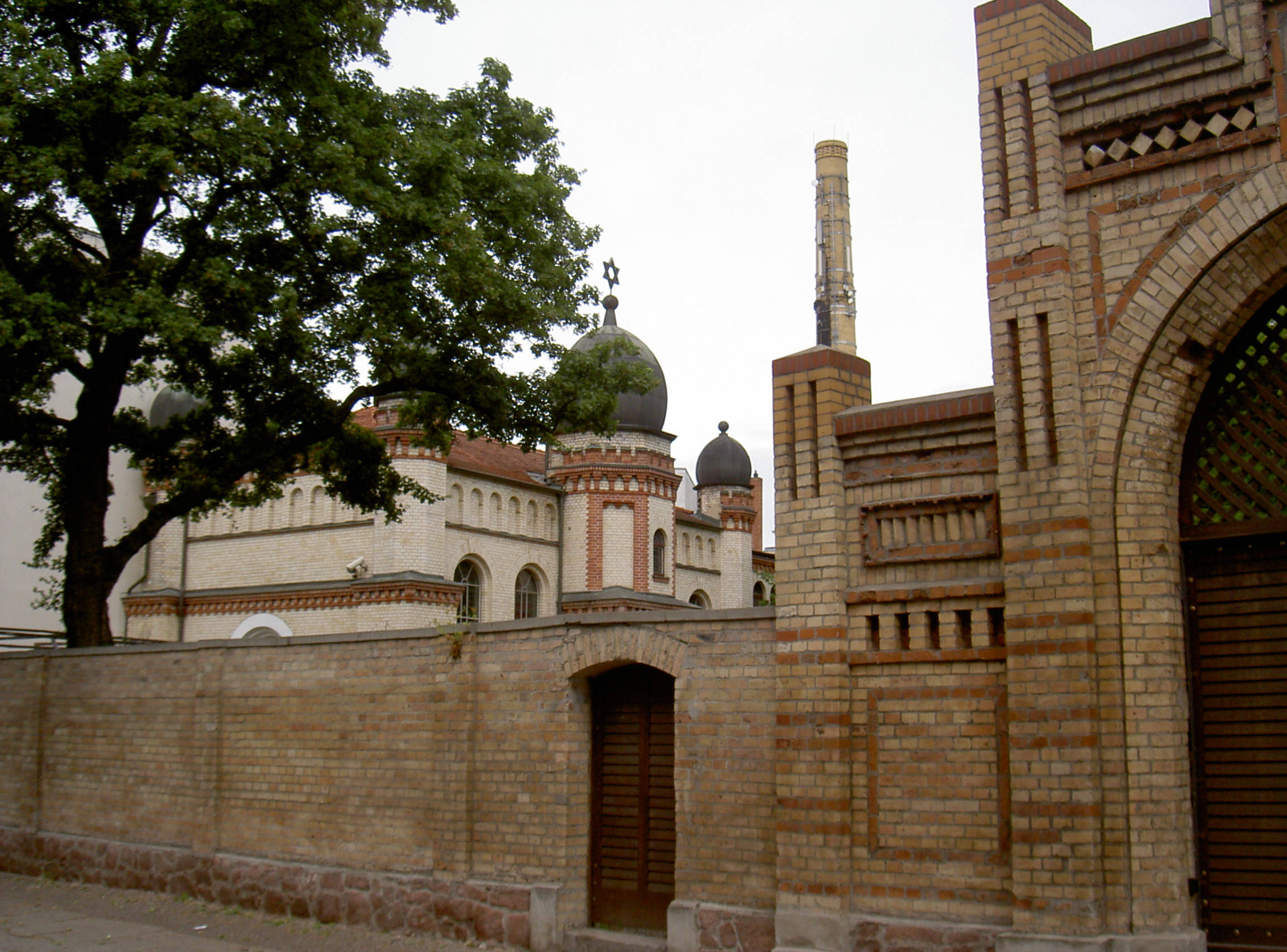 Synagoge in Halle (Saale), Jüdischer Friedhof, Humboldtstraße